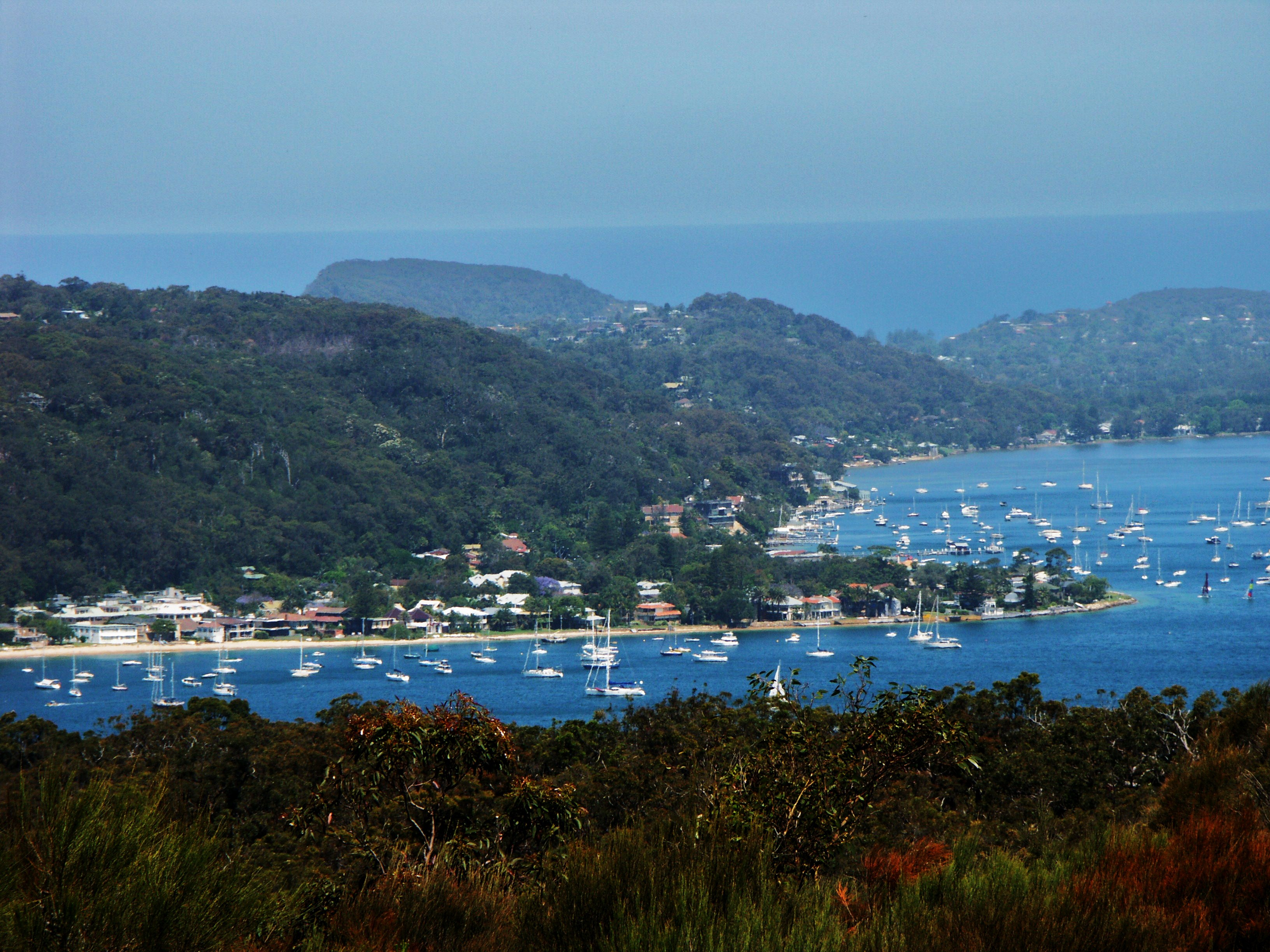 Pittwater